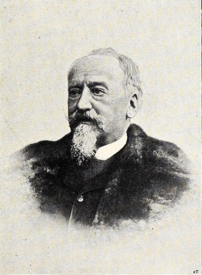 Giacomo Franco, archietto (1818-1895), da L'Edilizia Moderna (1895)